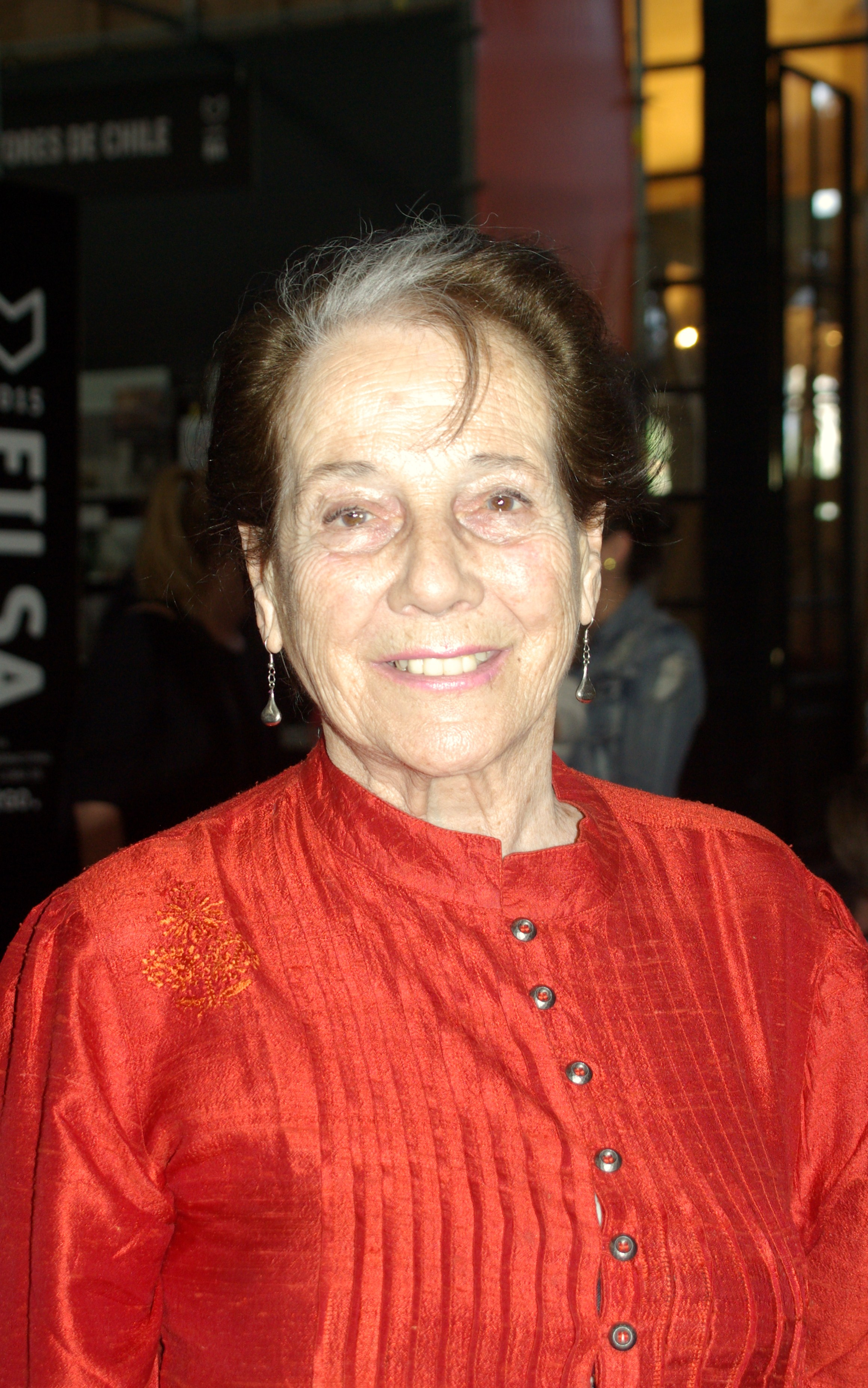 La escritora chilena Mónica Echeverría en la Feria Internacional del Libro de Santiago 2015